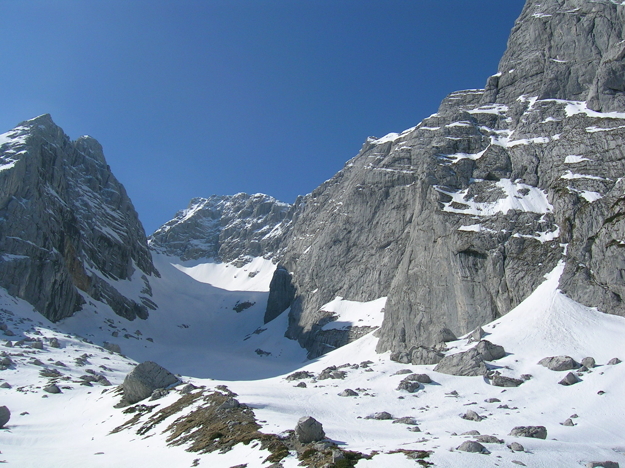 Blaueis glacier from Blaueishütte (spring 2007)